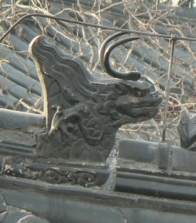 鸱尾